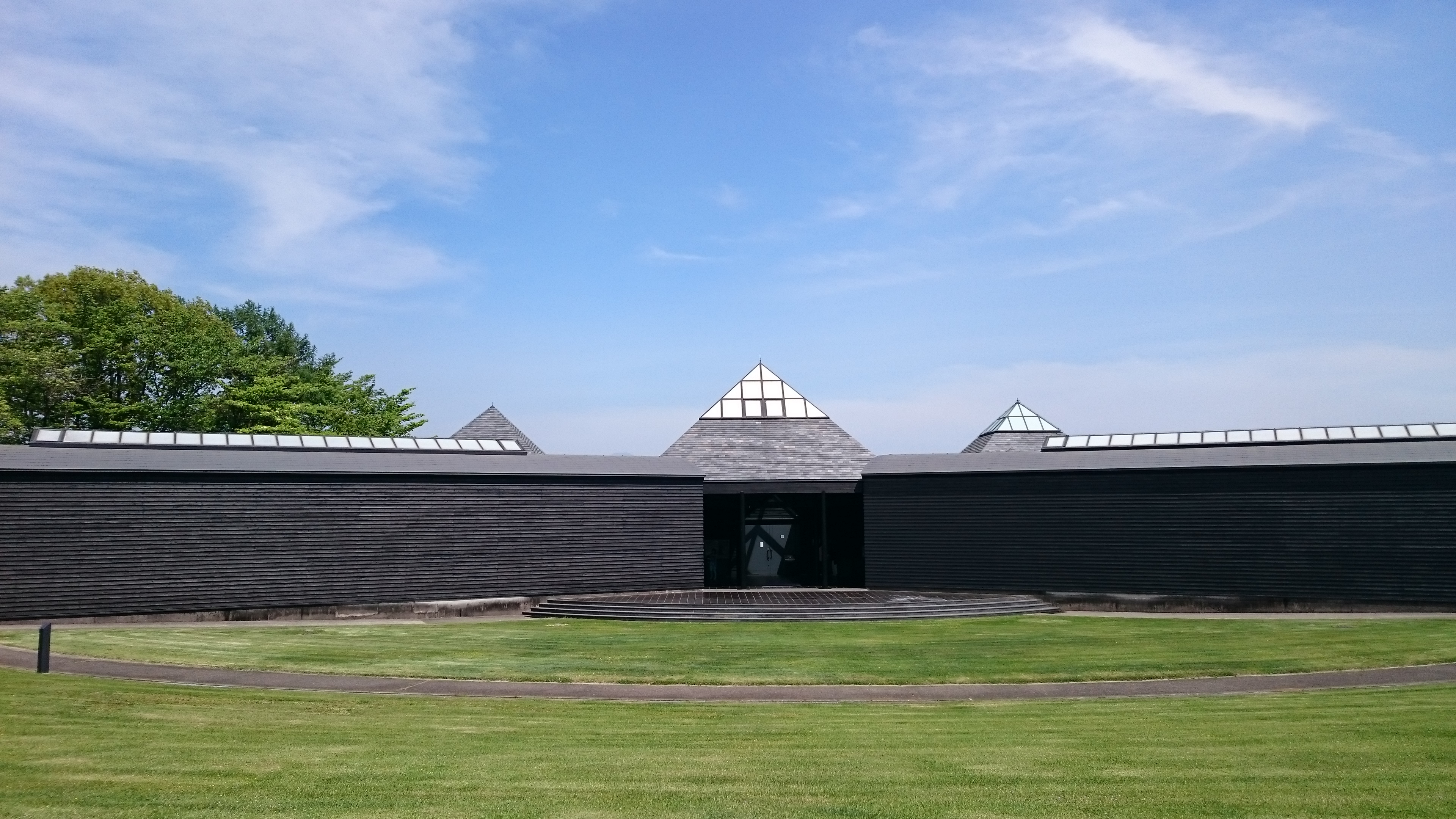 ハラミュージアムアーク 外観